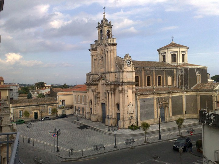 Chiesa Madre e Piazza Maggiore di Aci Sant'Antonio